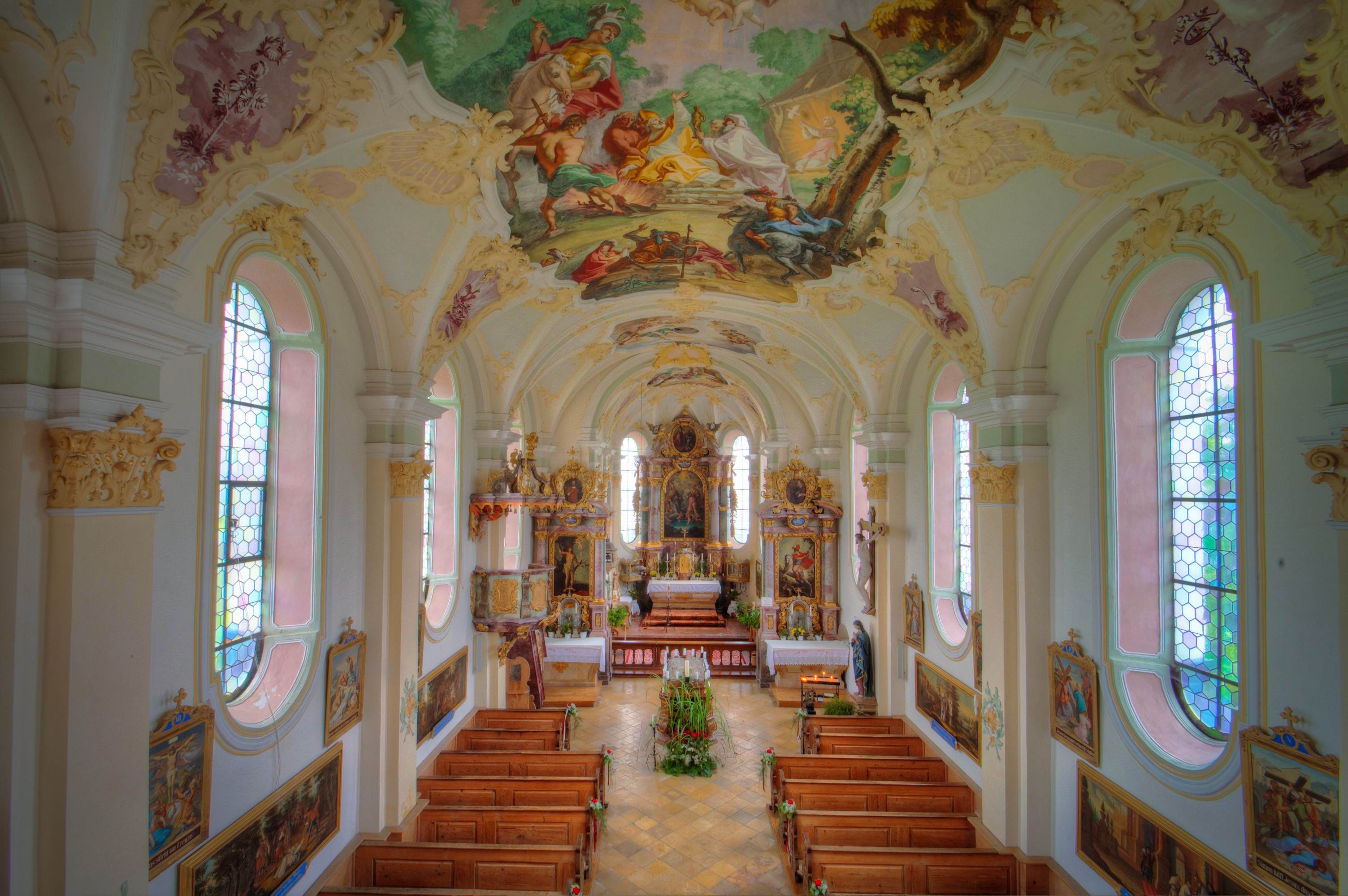 St. Marinus und Anian Kirche in Wilparting (Irschenberg)This is a photograph of an architectural monument.